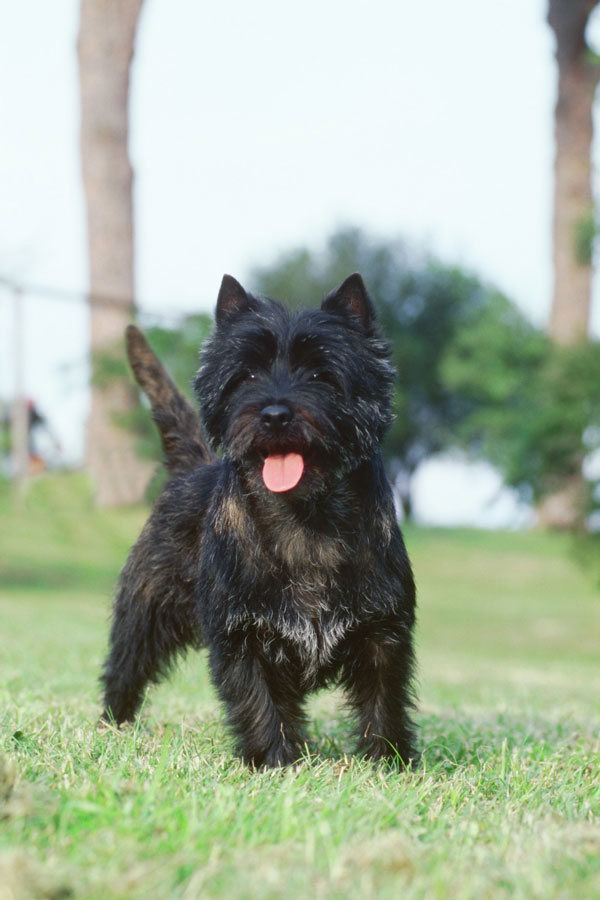 Cairn Terrier Attractive Alex dell'Allevamento Reds Flame